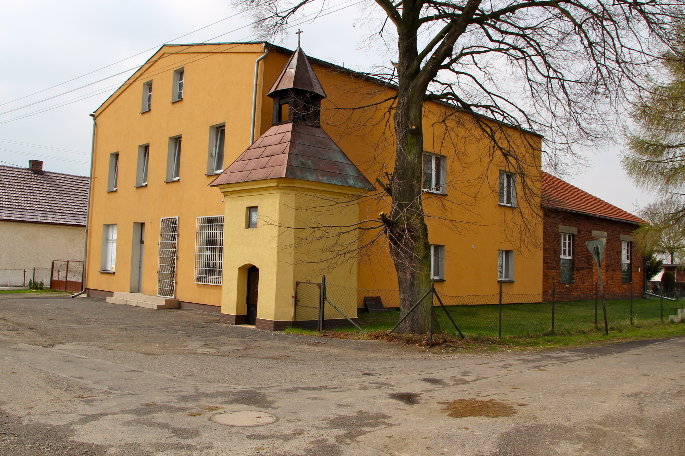 Radziejów, (dodatkowa nazwa w j. niem. Juliusburg), – wieś w Polsce w województwie opolskim, w powiecie kędzierzyńsko-kozielskim, w gminie Reńska Wieś.